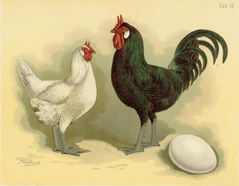 Laflèche-Huhn. Gallus. dom. cristatus andegavensis. Laflèche fowl. La Flèche.